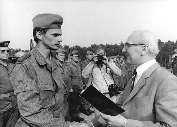 DDR, NVA-Truppenbesuch, Honecker ADN-ZB Mittelstädt 21.6.84 DDR: Truppenbesuch- Während des Kampfmeetings zum Abschluß des Truppenbesuchs verlieh der Generalsekretär des ZK der SED, Erich Honecker, Vorsitzender des Staatsrates und des Nationalen Verteidigungsrates der DDR, an Major Bergmann die Verdienstmedaille der DDR. [neben Honecker: Heinz Hoffmann und Horst Stechbarth (verdeckt)] Abgebildete Personen: Honecker, Erich: Staatsratsvorsitzender, Generalsekretär des ZK der SED, DDR (GND 118553399) Hoffmann, Heinz: Minister für Nationale Verteidigung, Mitglied des ZK der SED, DDR